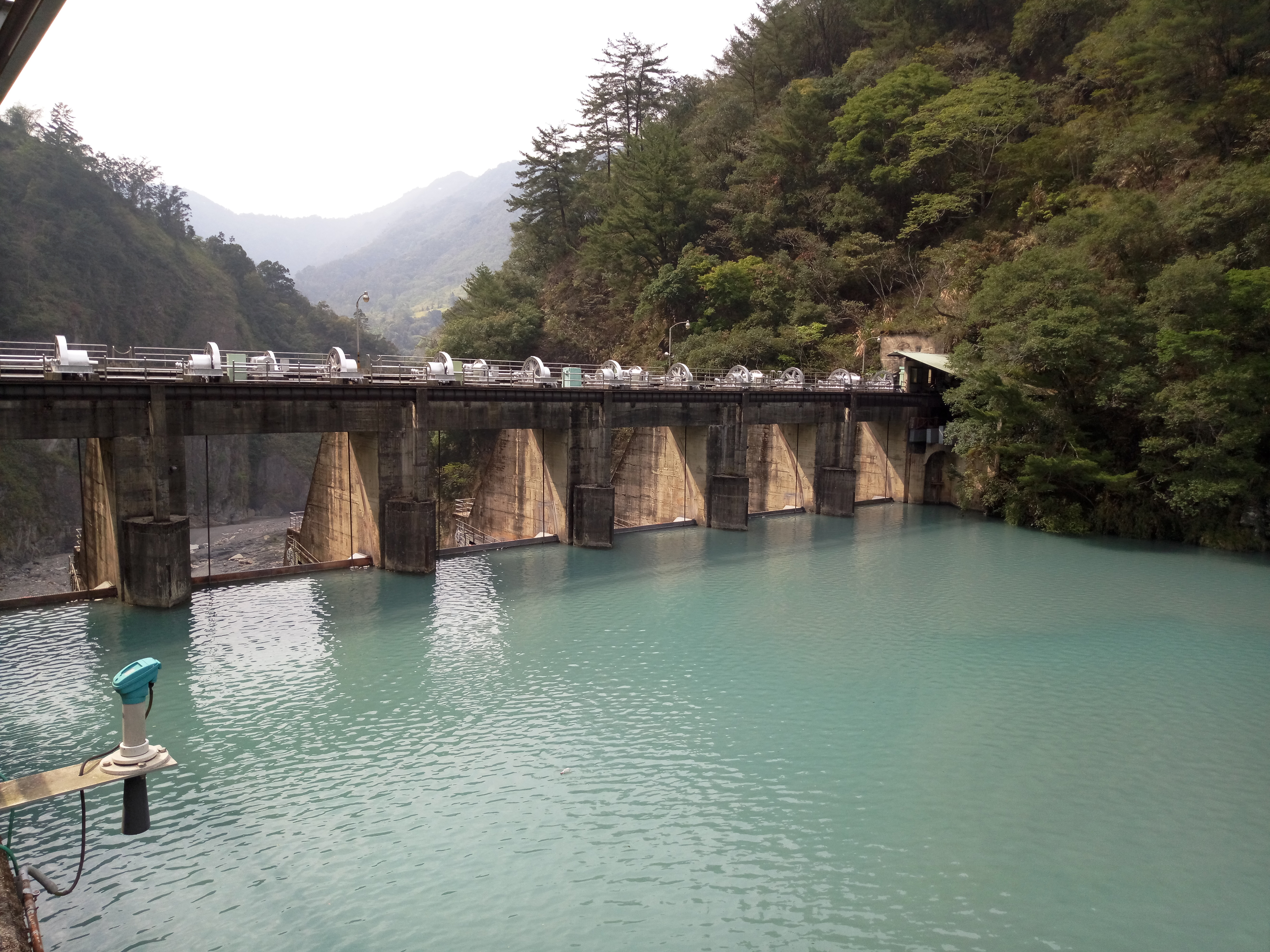 武界壩大壩排洪閘門